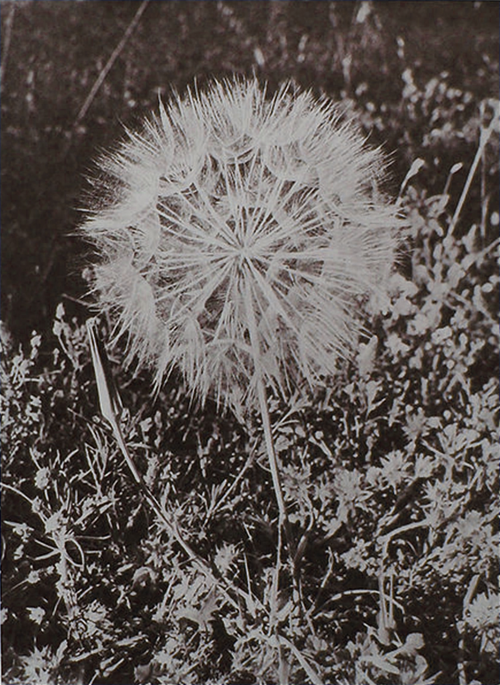 Heliogravüre von Ilse Salberg (1938): Löwenzahnblüte